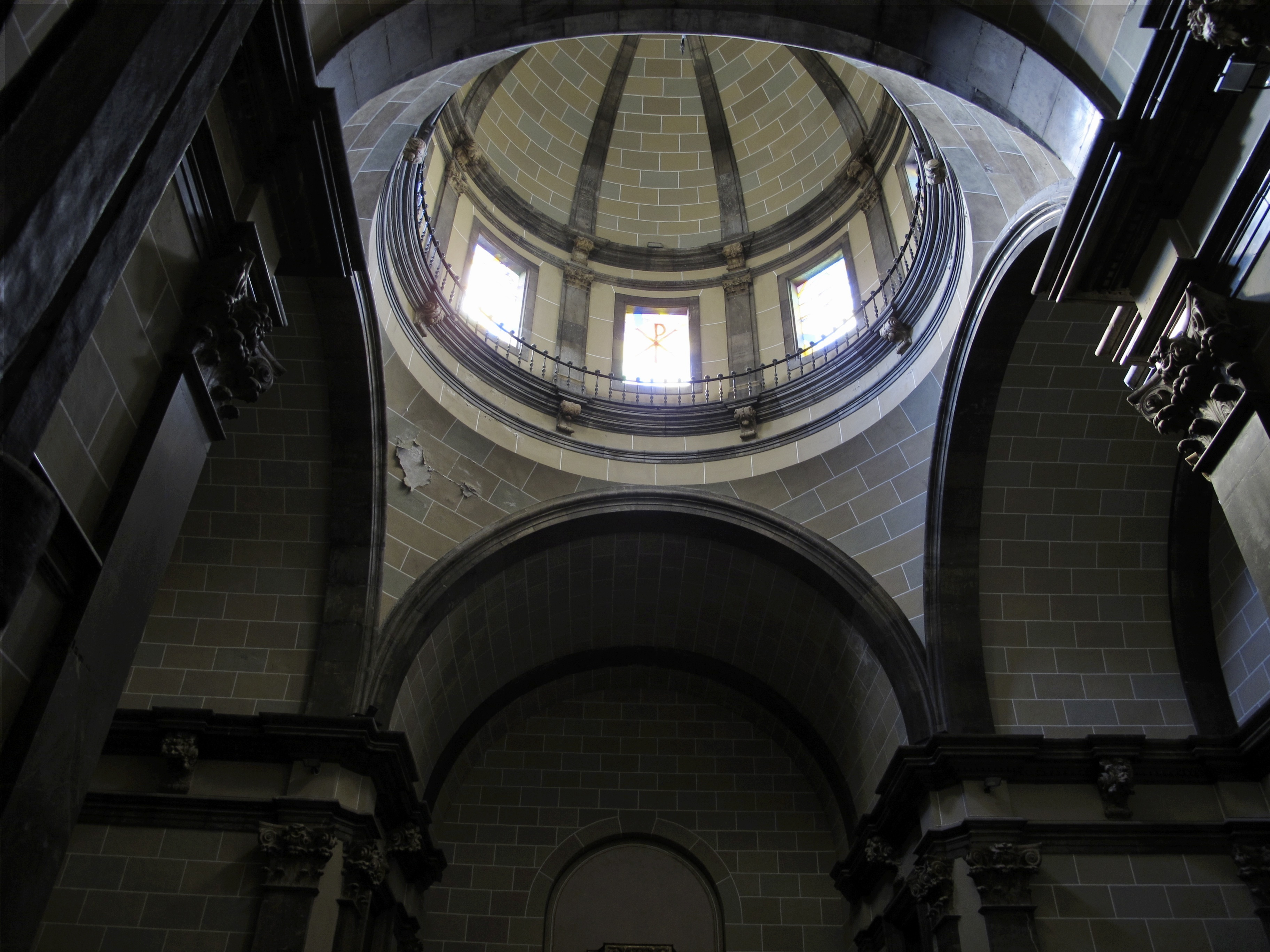 Reus (Katalonien): Pfarrkirche Sant Pere, Innenansicht, Kuppel